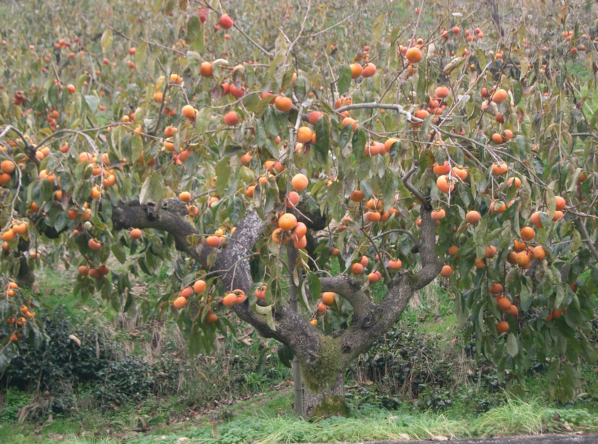 Diospyros kaki